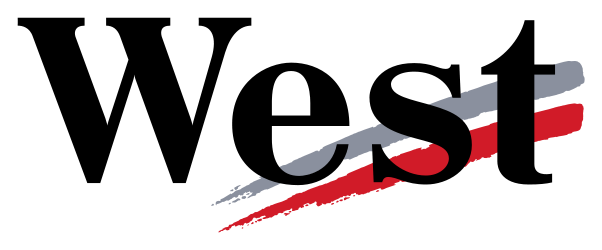 Logotipo de West